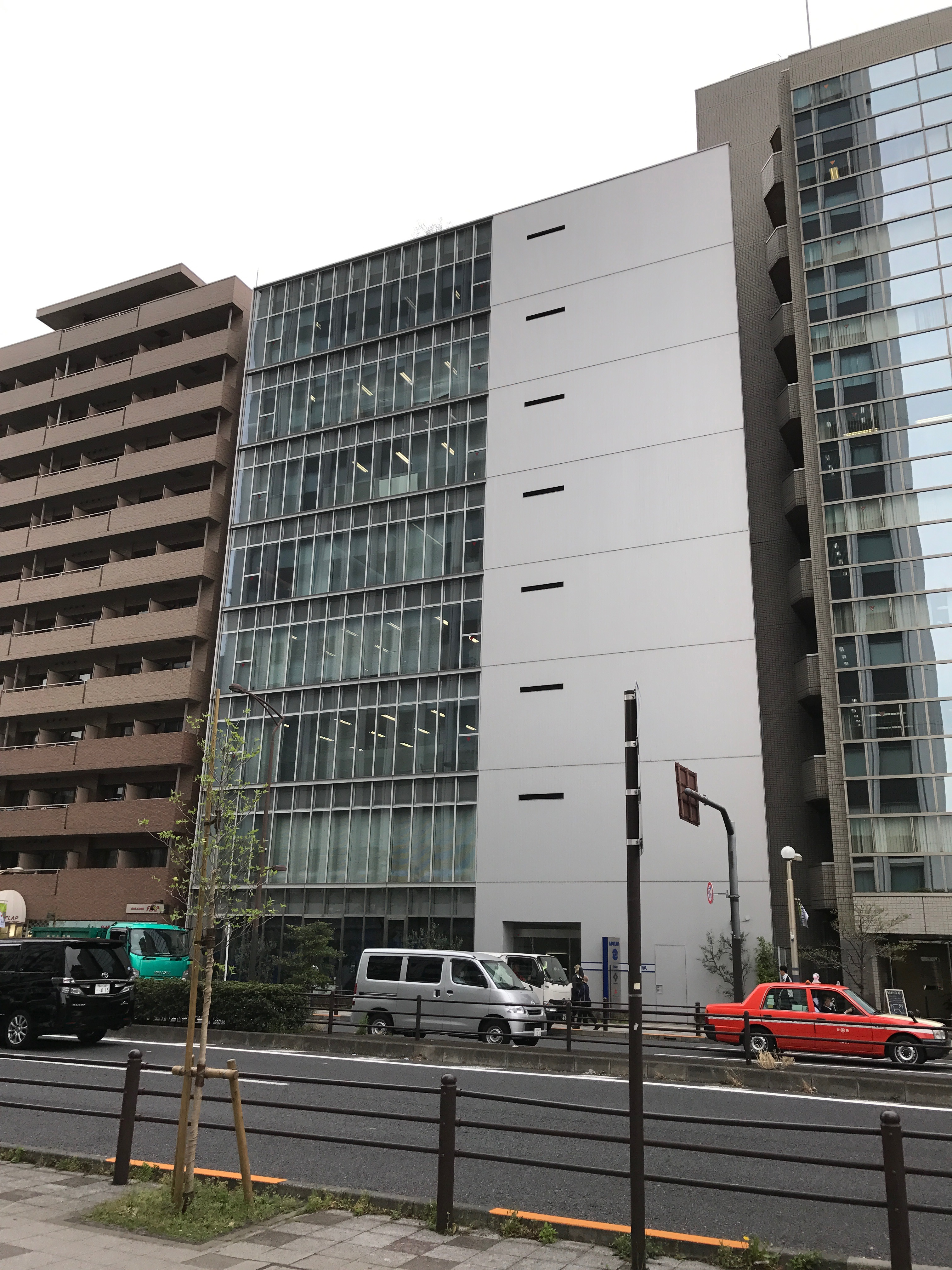 MARUWAビル